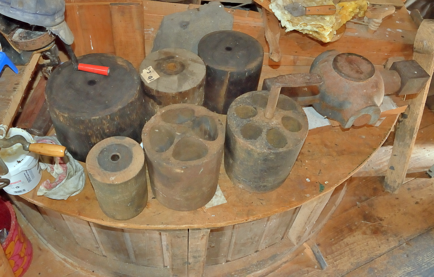 De Heidebloem, Erica